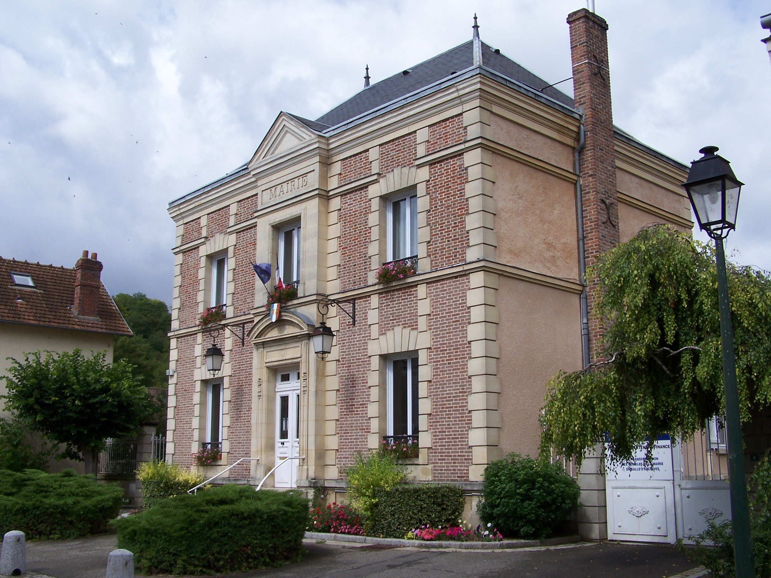 Hôtel de ville de Mareil-sur-Mauldre (Yvelines, France). Photo personnelle. Town hall of Mareil-sur-Mauldre (Yvelines, France). Personal photo. Auteur/Author : ℍenry Salomé